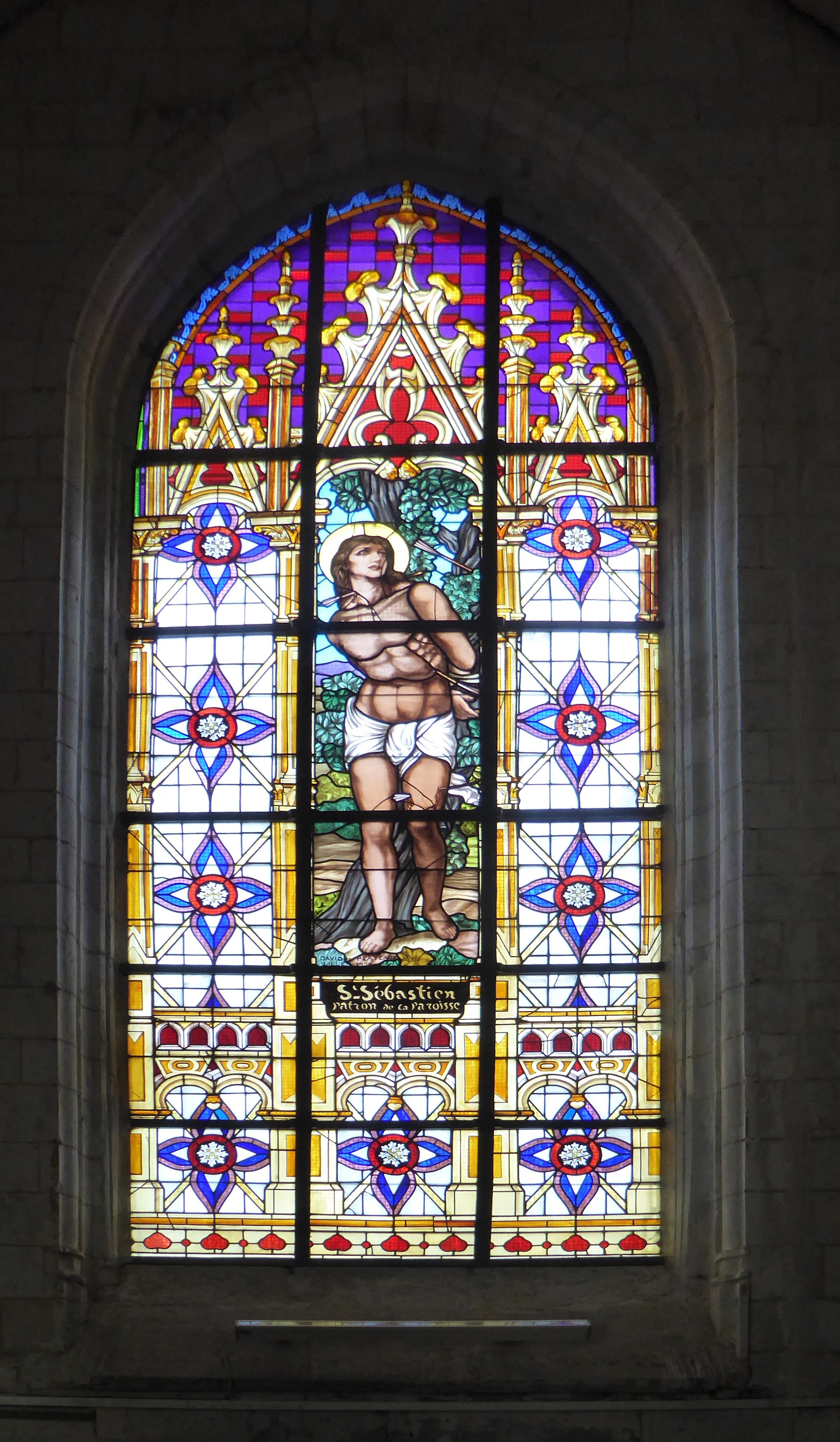 Vitrail du bas-côté nord du chœur, représentant le saint patron de l'église, Saint-Sébastien, martyr romain. Villeneuve-d'Ascq,France